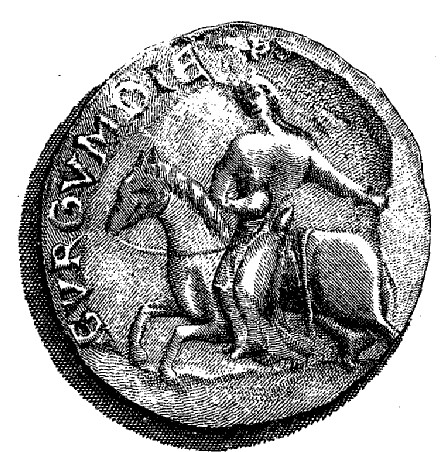 Sceau Alix de Vergy, duchesse de Bourgogne